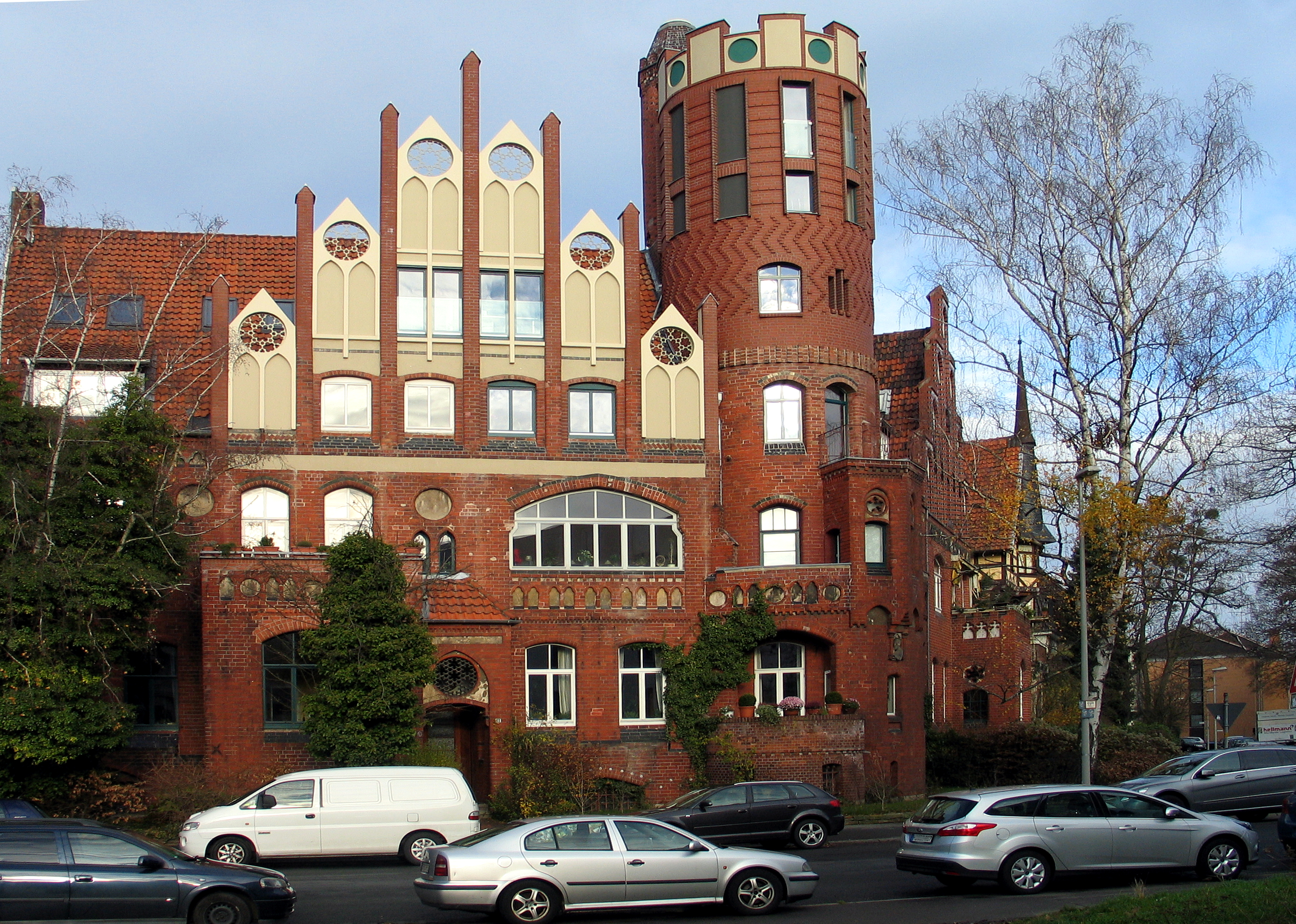 Der heute denkmalgeschützte Backsteinbau am Herrenhäuser Kirchweg 11 Ecke Reinholdstraße im Stadtteil Nordstadt von Hannover; der Architekt Karl Mohrmann, Schüler von Konrad Wilhelm Hase, Professor für mittelalterliche Baukunst und Entwerfen und Konsistorialbaumeister, errichtete es um 1900 (bis 1902 auch das Nachbargebäude Reinholdstraße 5) als eigenen Wohnsitz. Nach starken Zerstörungen im Zweiten Weltkrieg wurde das Haus Ende der 1940er Jahre aufgrund der allgemeinen Wohnungsnot zunächst lediglich notsaniert, später sollte es abgerissen werden. Einer der Urenkel Mohrmanns, der berliner Architekt Lutz Weisser, Mitglied der Erbengemeinschaft, beauftragte seinen hannoverschen Kollegen Thomas Ceglarek mit einer Sanierung insbesondere des Eckturmes bis in Höhe des ehemaligen Treppenaufganges. Die ehemals reich verzierten Giebe und Zinnenl, die in Richtung des Herrenhäuser Kirchwegs zeigen, wurden schon in der Nachkriegszeit verändert und haben nun eine schlichte Putzfassade. Ceglarek, der bereits den Umbau der Marienburg bei Nordstemmen plante, ersetzte die ehemaligen Rosetten zwischen den Zinnen nach einem im Keller des Hauses gefundenen Originals durch Nachbauten aus Edelstahl ...